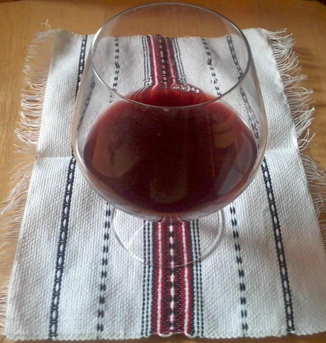 Знято мобілкою Самсунг